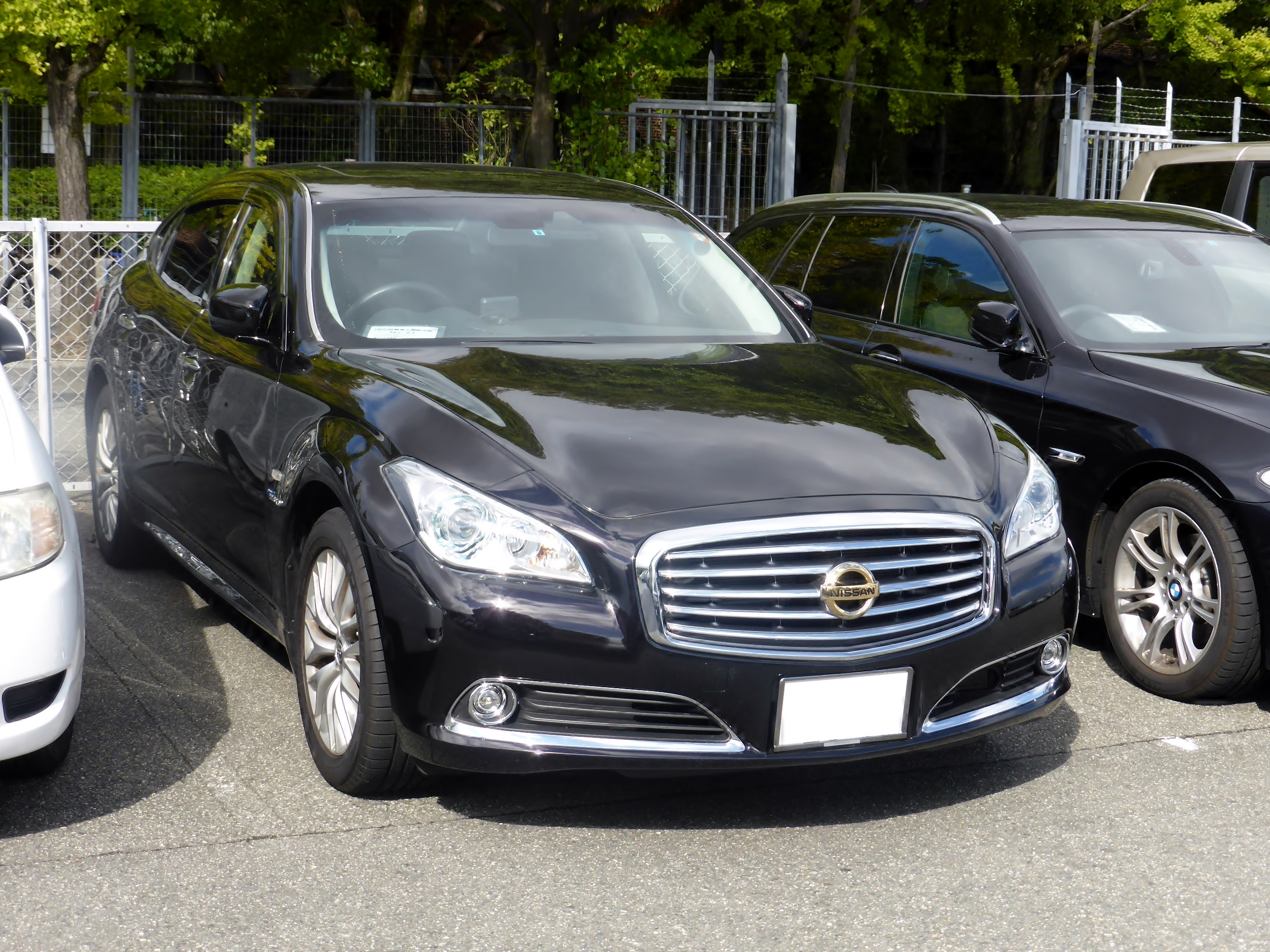 HGY51型日産・シーマをフロントから撮影。